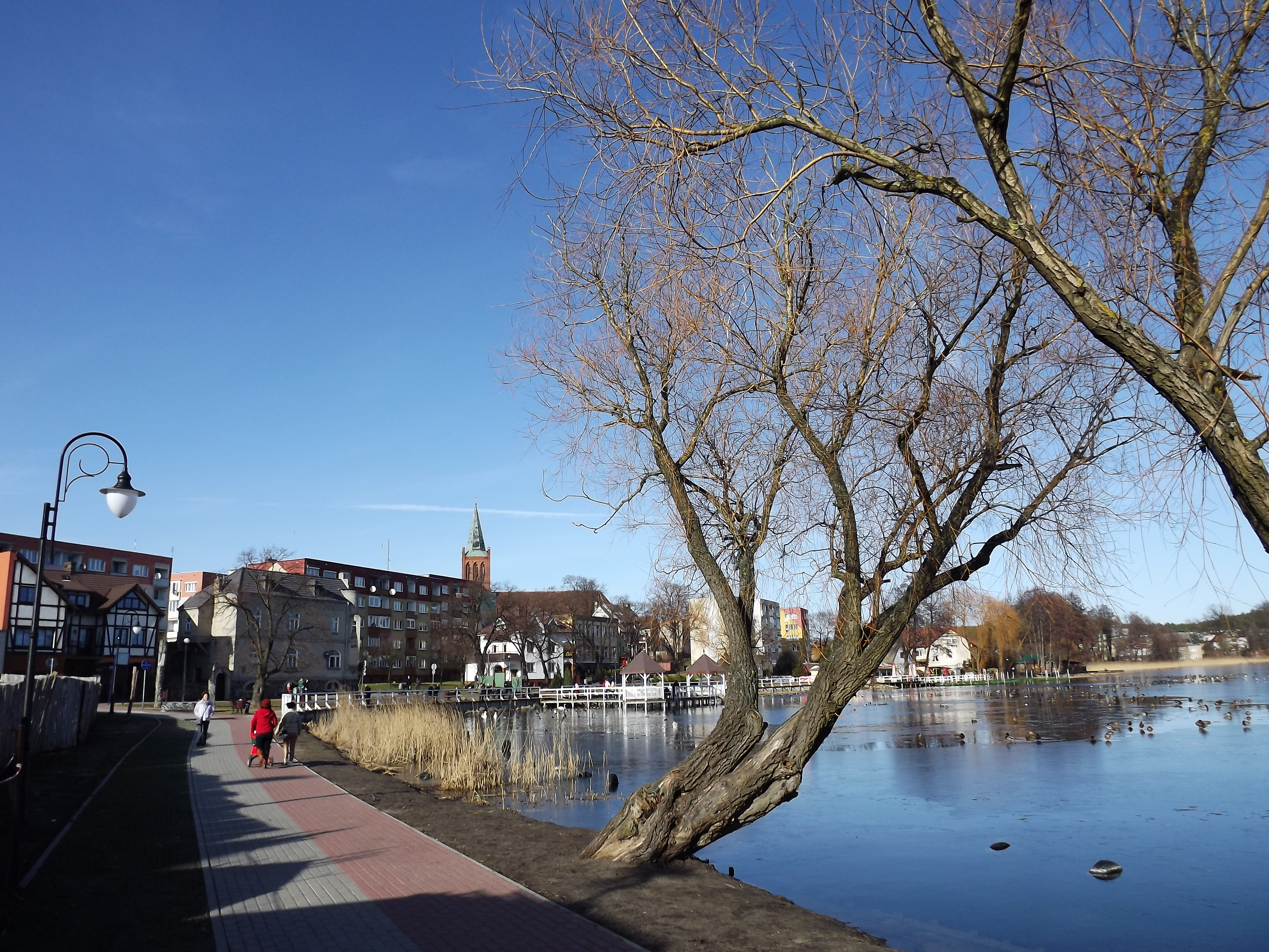 Widok Barlinka